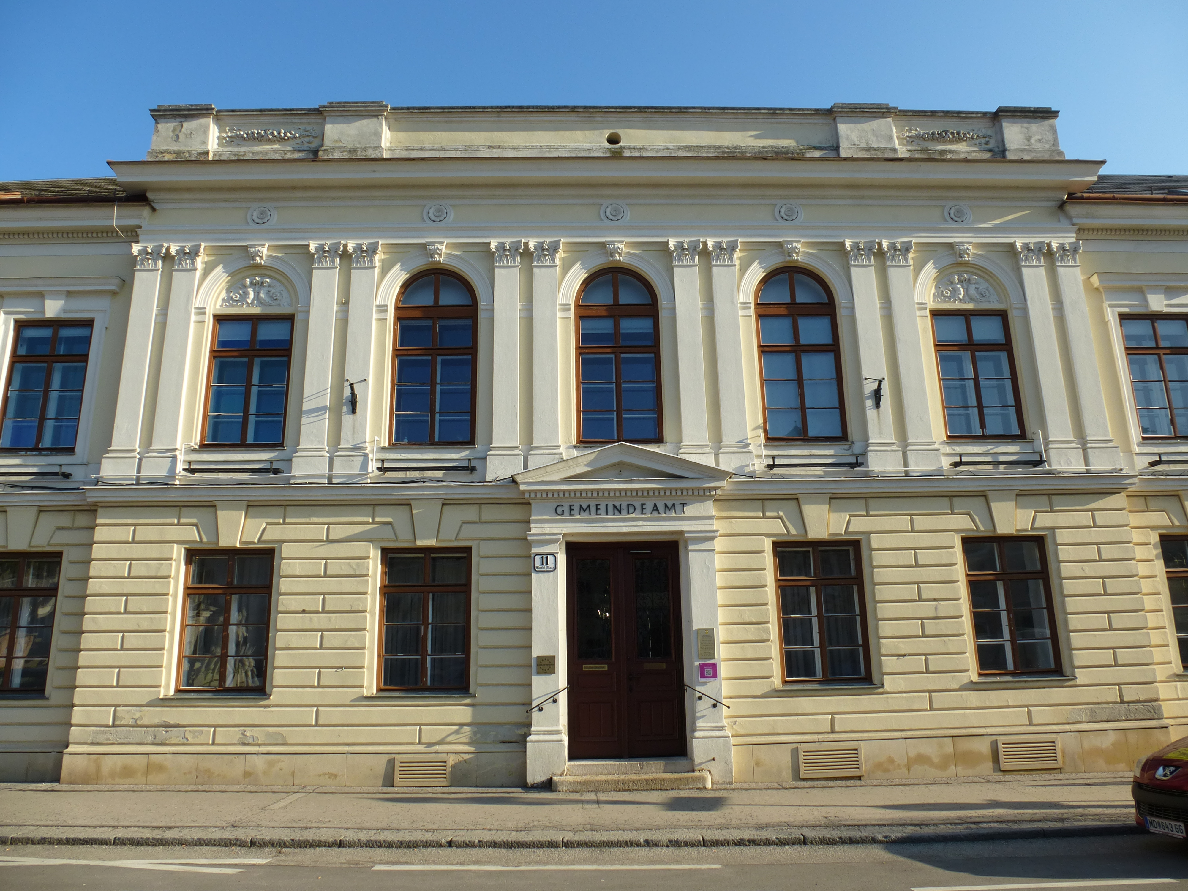 Gemeindeamt